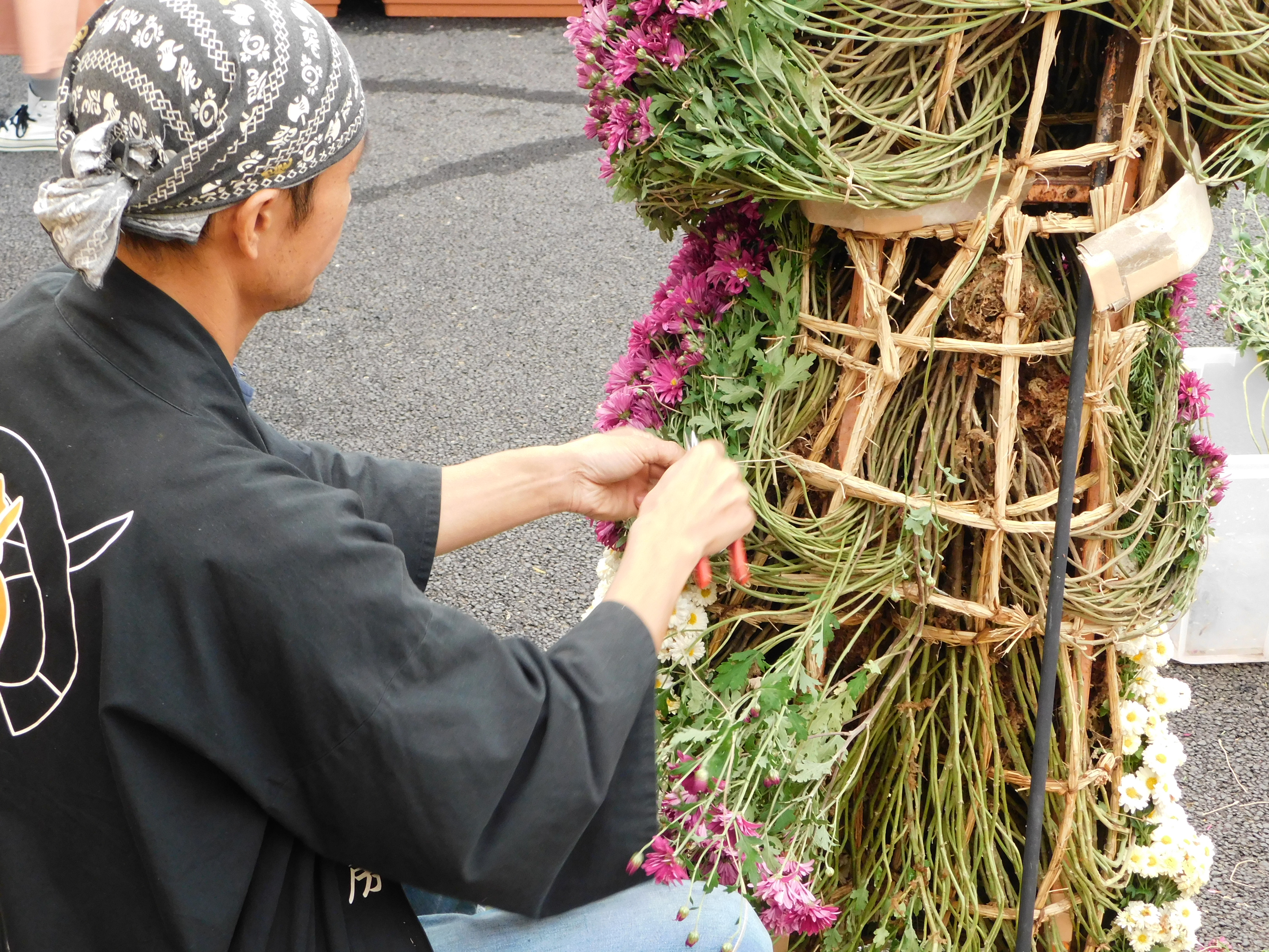 人形に菊付けをおこなう菊師、たけふ菊人形会場にて。